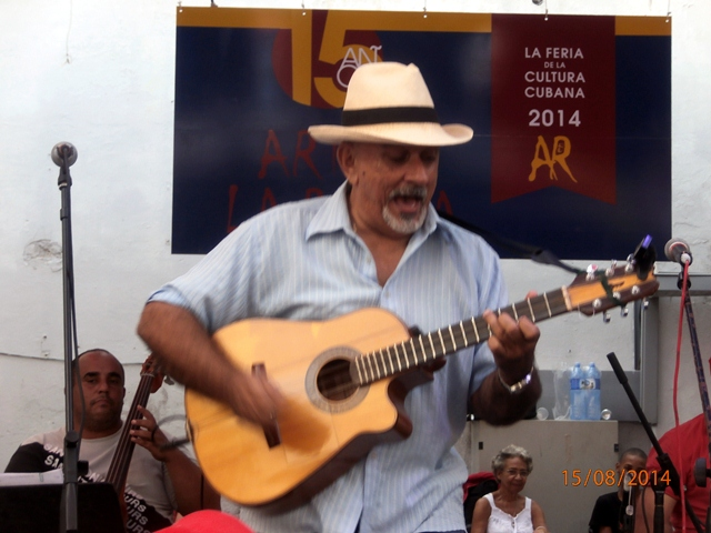 Músico cubano